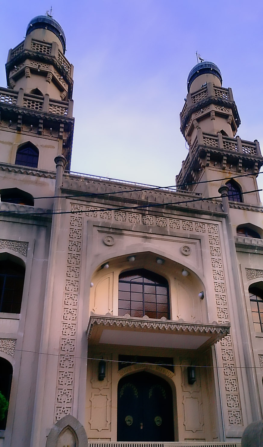 Kobe-mosque